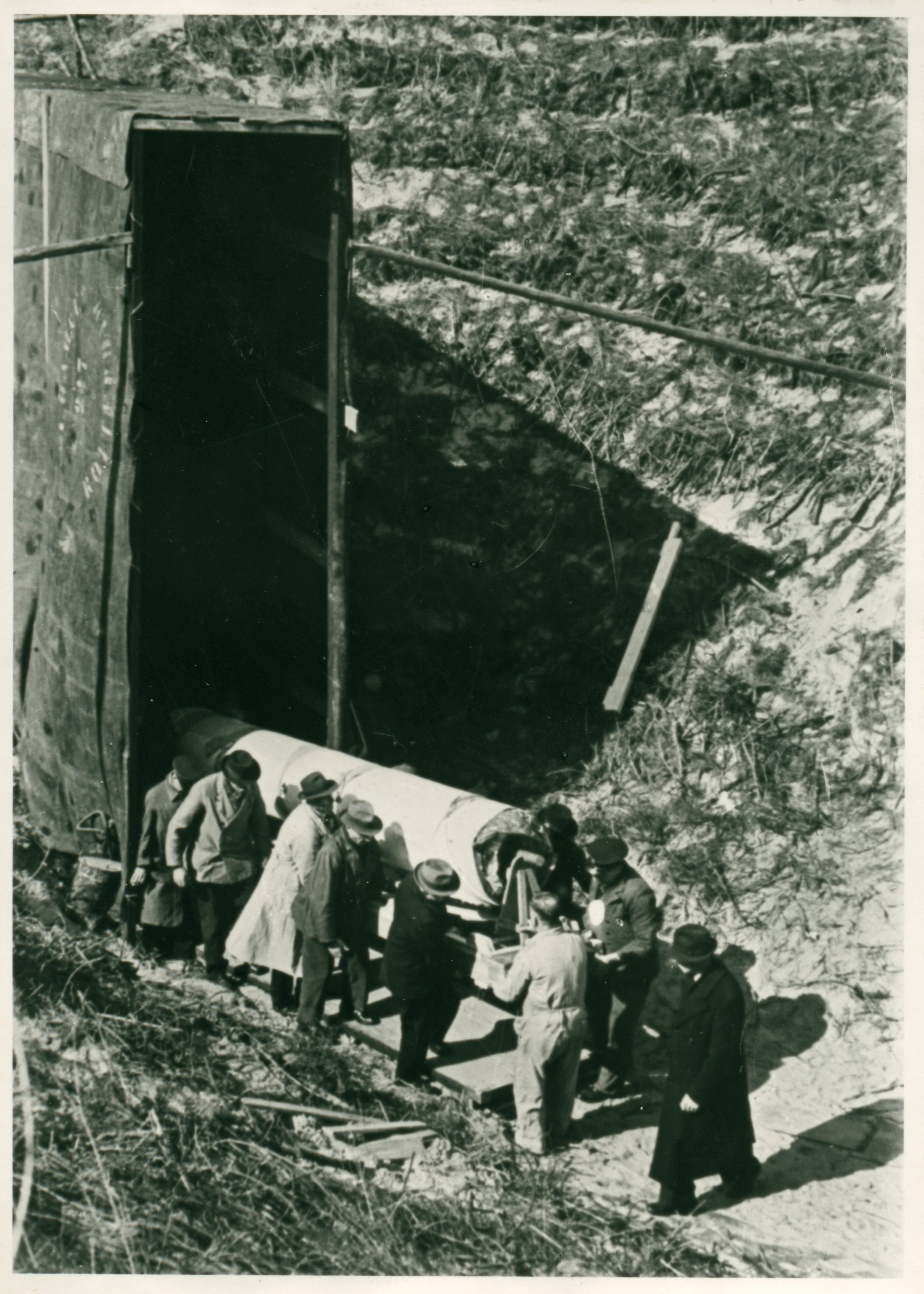 Onderschrift bij deze afdruk: "de Nachtwacht opgerold; wordt vervoerd van Castricum naar Heemskerk ?? zie; Baard pag. 41." De bomvrije kelders werden in 1940 gebouwd, nadat de andere schuilplaatsen niet veilig bleken. Na een verblijf in Kasteel Radbout en de gemeentelijke schuilkelder te Castricum werd de Nachtwacht opgerold in de schuilkelders te Heemskerk ondergebracht. In 1941 werden de nieuwe kelders in gebruik genomen.